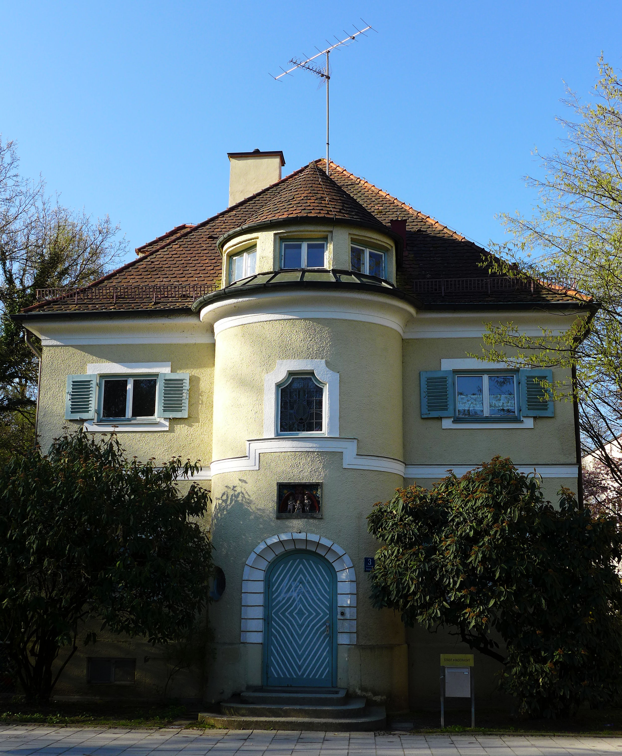 Avenariusstr. 3, München